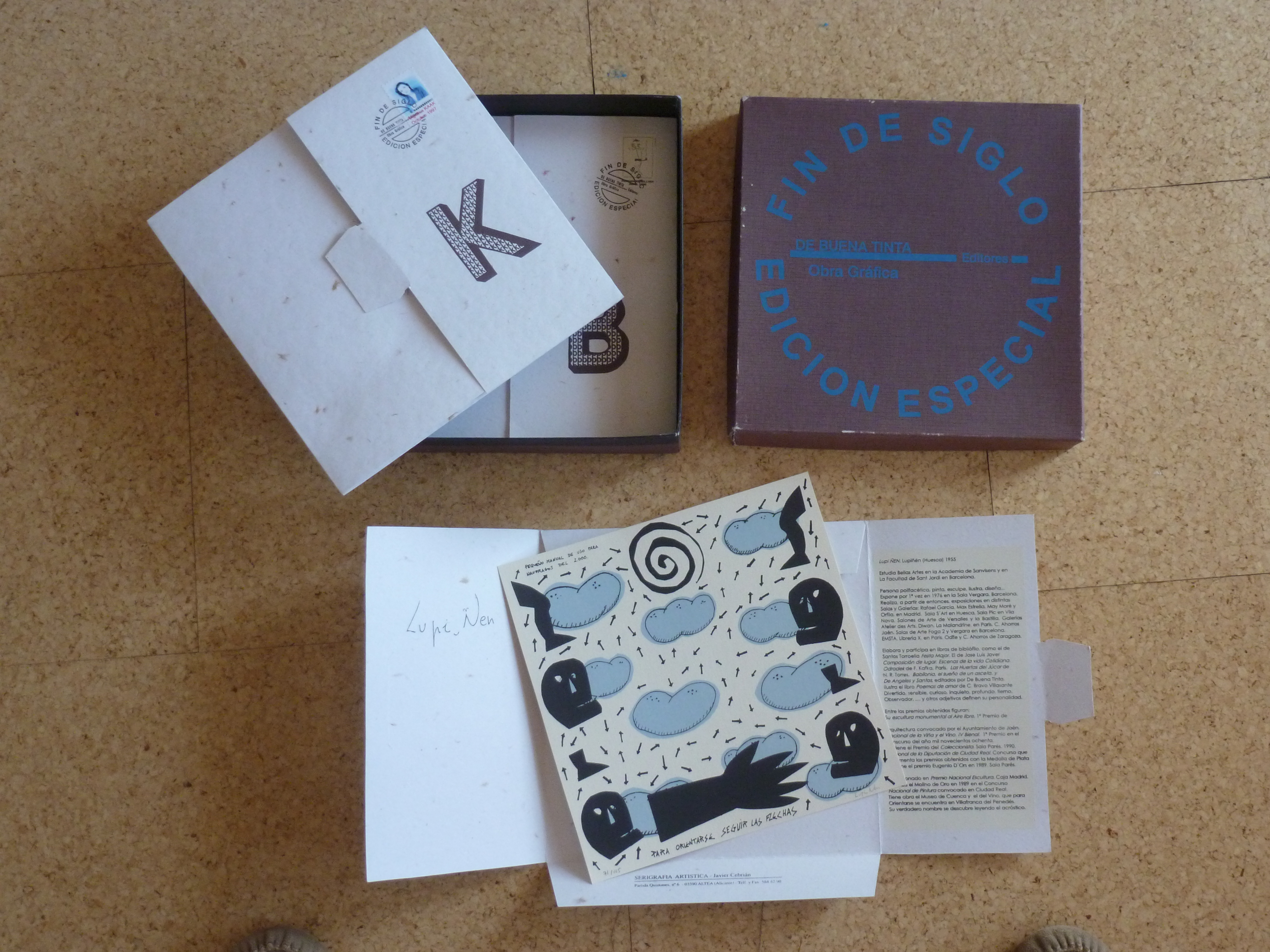 Colección "Fin de siglo". 27 serigrafías, un artista por cada letra del alfabeto. 24 x 24 cm. 125 ejemplares. 1999.